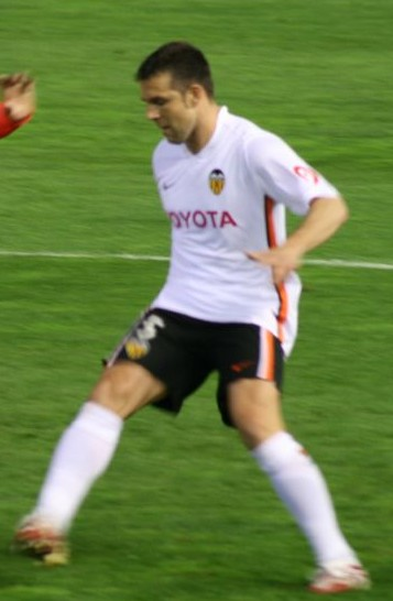 Carlos Marchena i Luis Fabiano a un València-Sevilla de 2007.